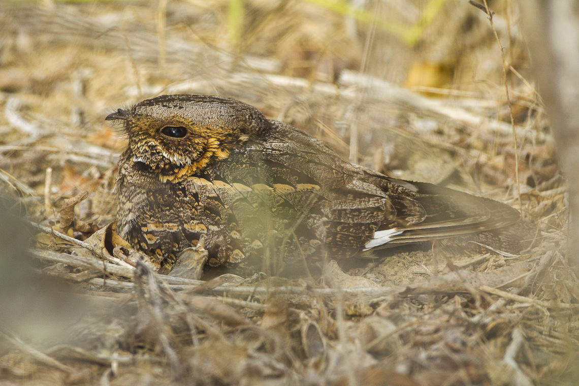 Madagascar Nightjar - Tulear - Madagascar_S4E8596